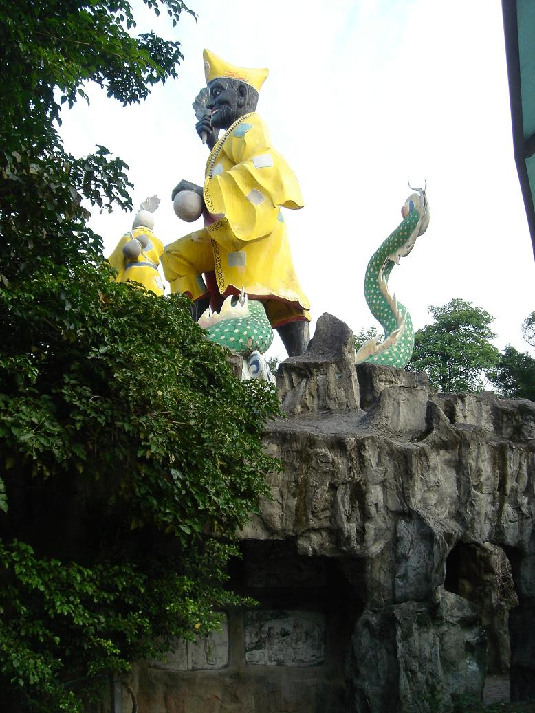 新北市中和區員山公園降龍尊者雕像。